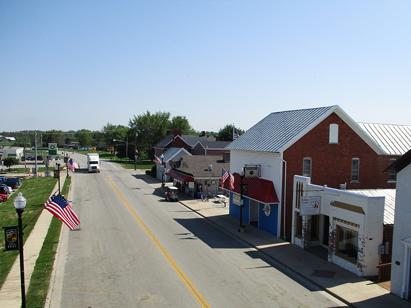 포르 로라미